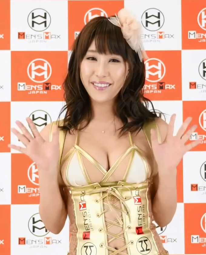 中文（香港）: 2017年上海成人展 AV女優彩美旬果簡介 46s